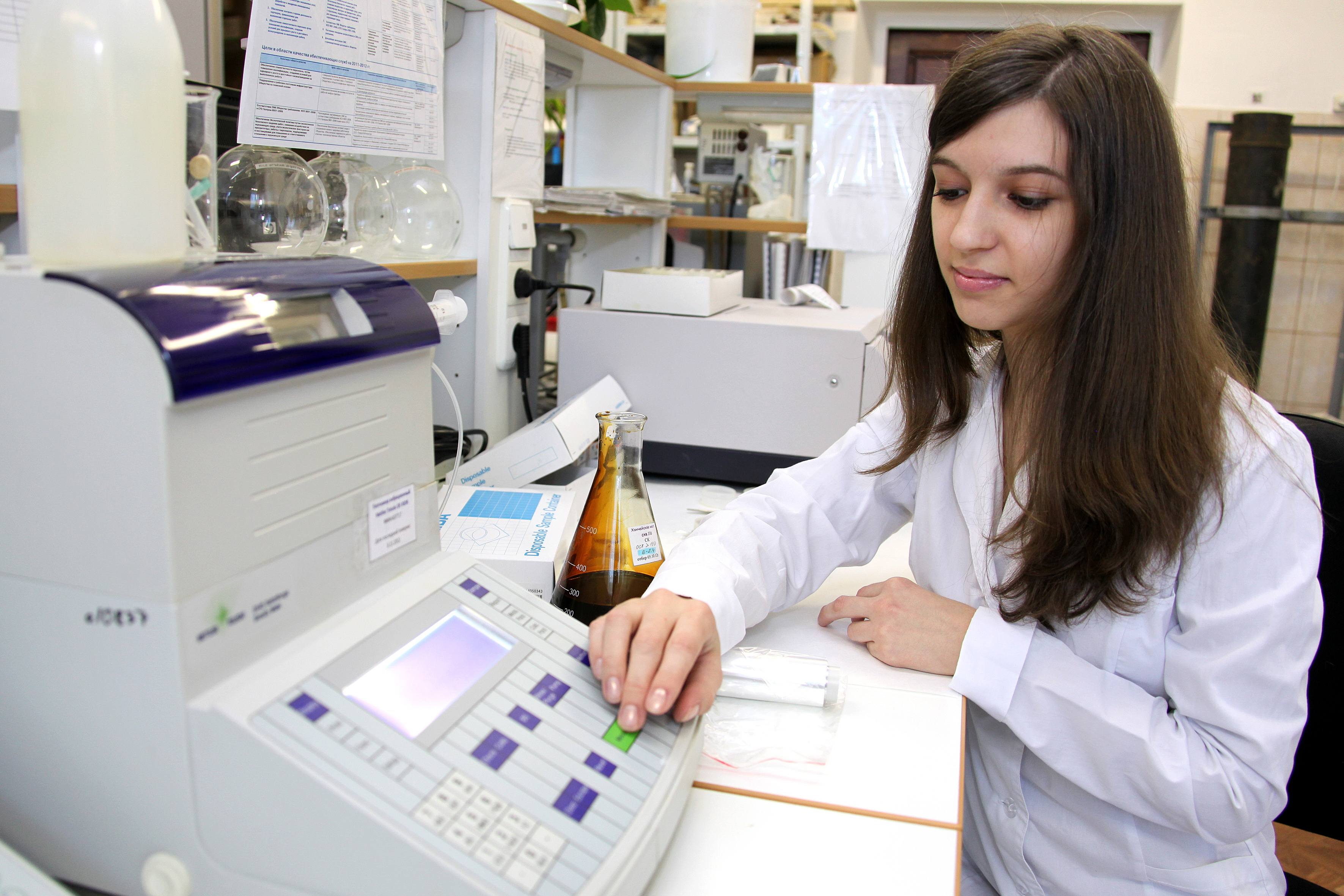 Центр изучения керна и пластовых флюидов ООО «ТюменНИИгипрогаз». г. Тюмень.